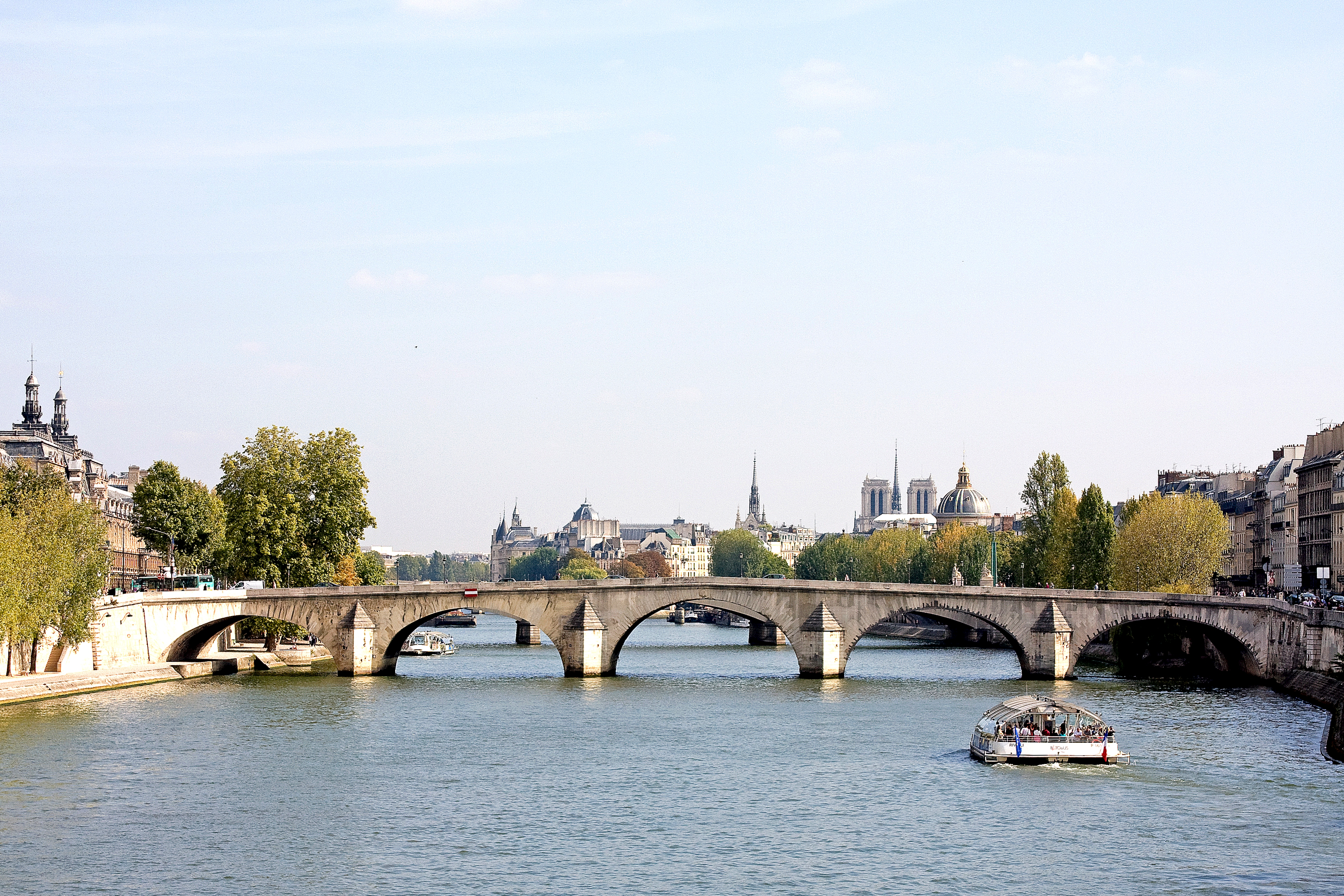 Vu de la passerelle Senghor (Paris)